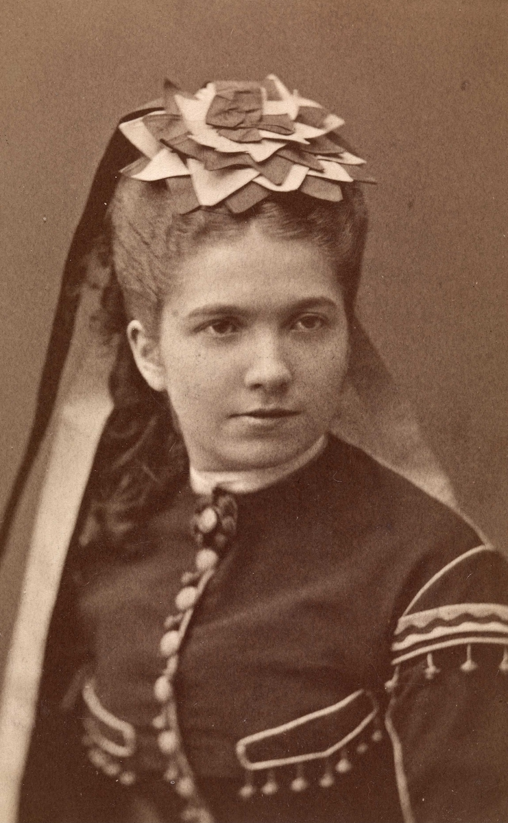 Portrett av Olefine Moe, c. 1870-80.